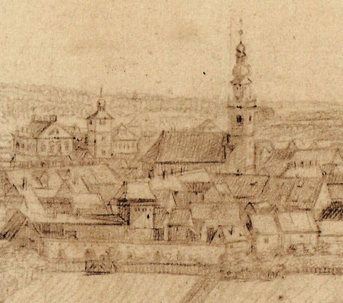 Erlangen. Blick von Norden auf die Altstädter Dreifaltigkeitskirche, davor der 1922 abgerissene Färberturm. Ausschnitt einer Zeichnung von Martin Simon Glaeser.